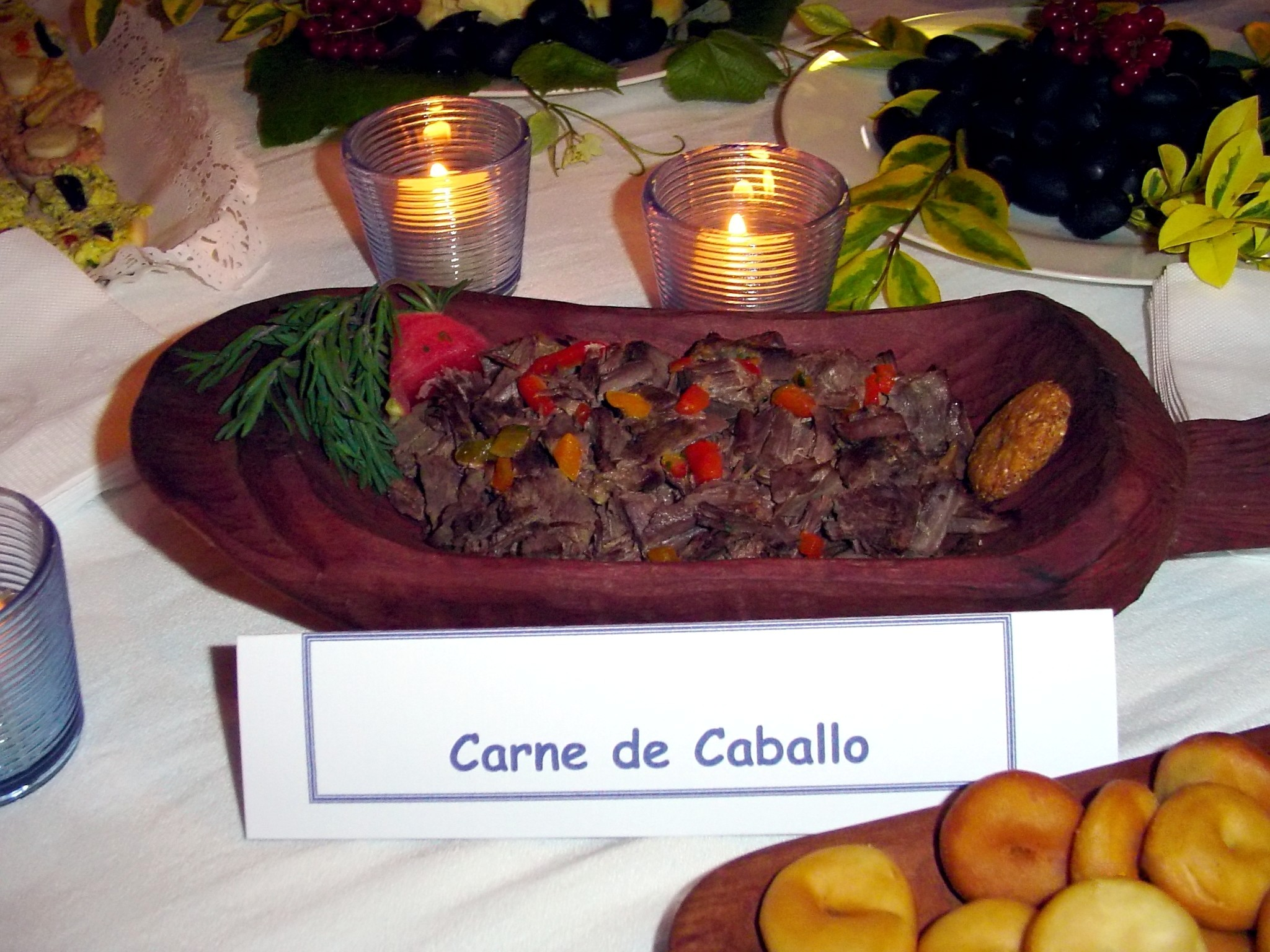 Comida Mapuche preparada en Curarrehue